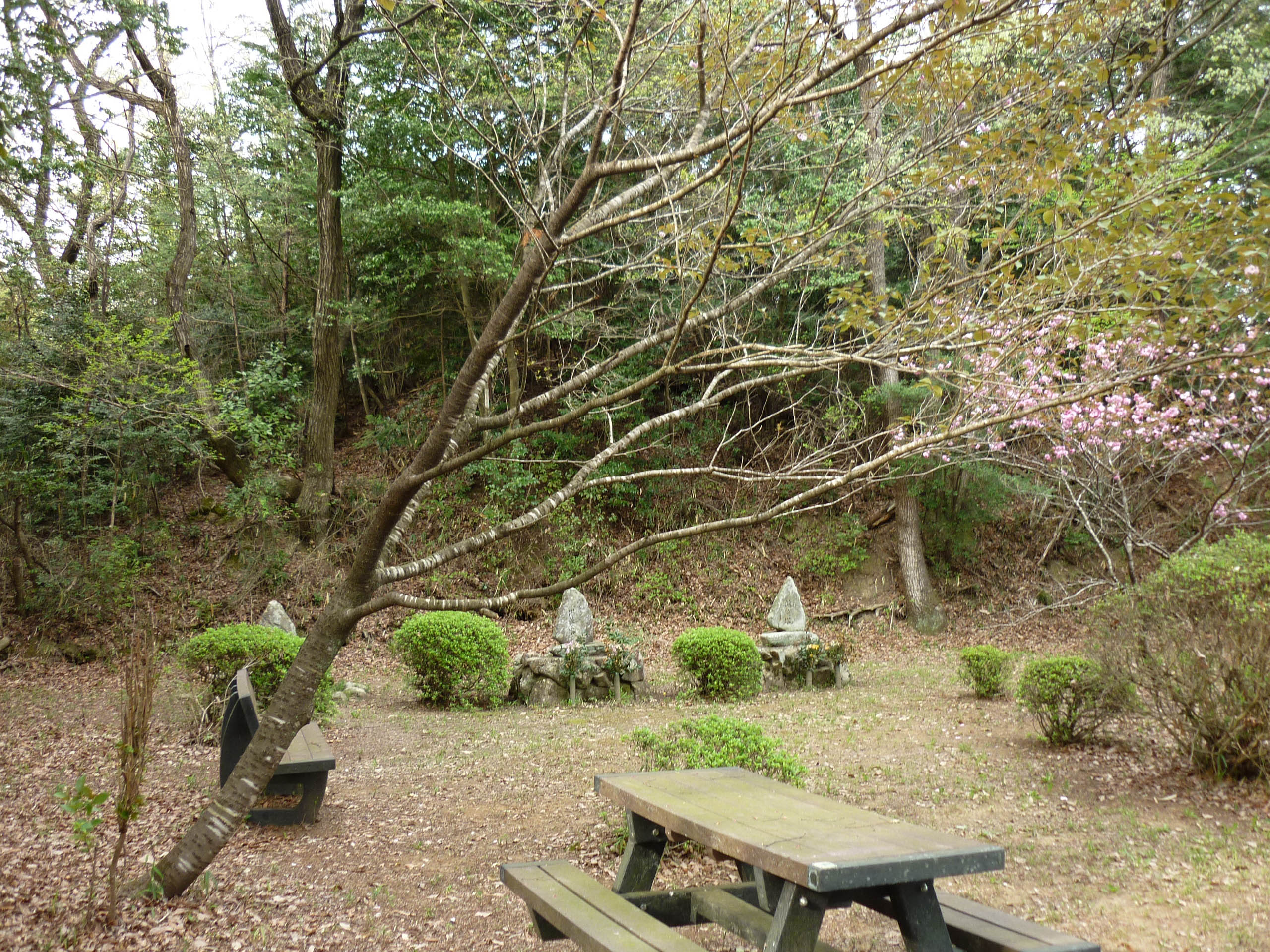 主郭跡